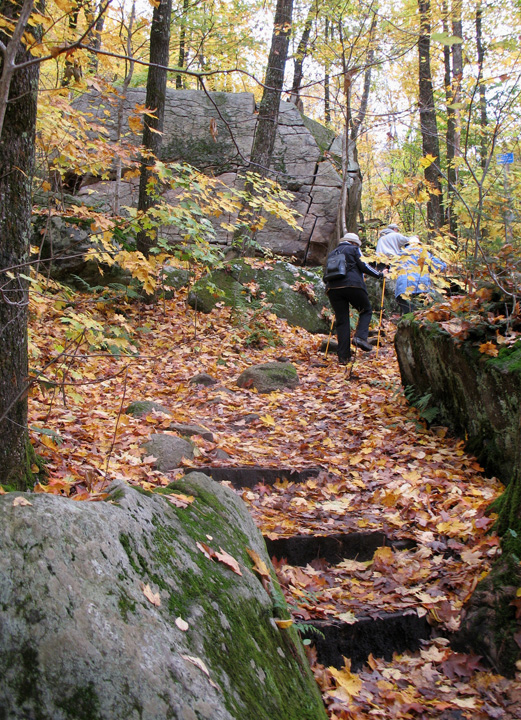 Forêt ancienne du Mont Wright, parc public de promenade et d'escalade à Stoneham-et-Tewkesbury au nord de la ville Québec dans région administrative de la Capitale-Nationale. Province de Québec, Canada.